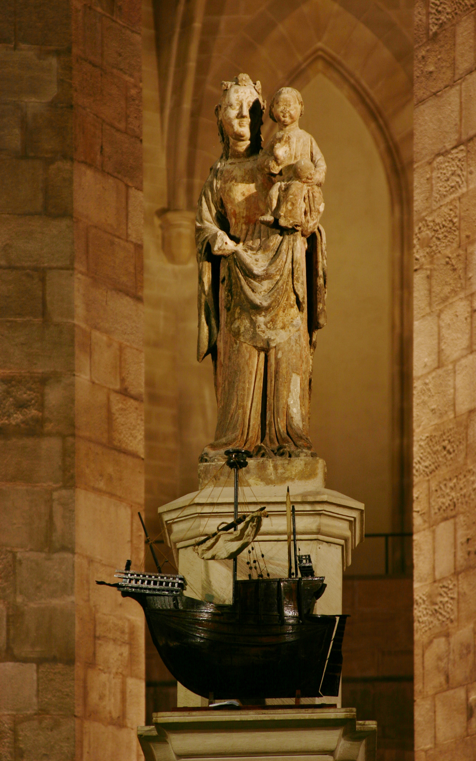 Basílica de Santa Maria del Mar